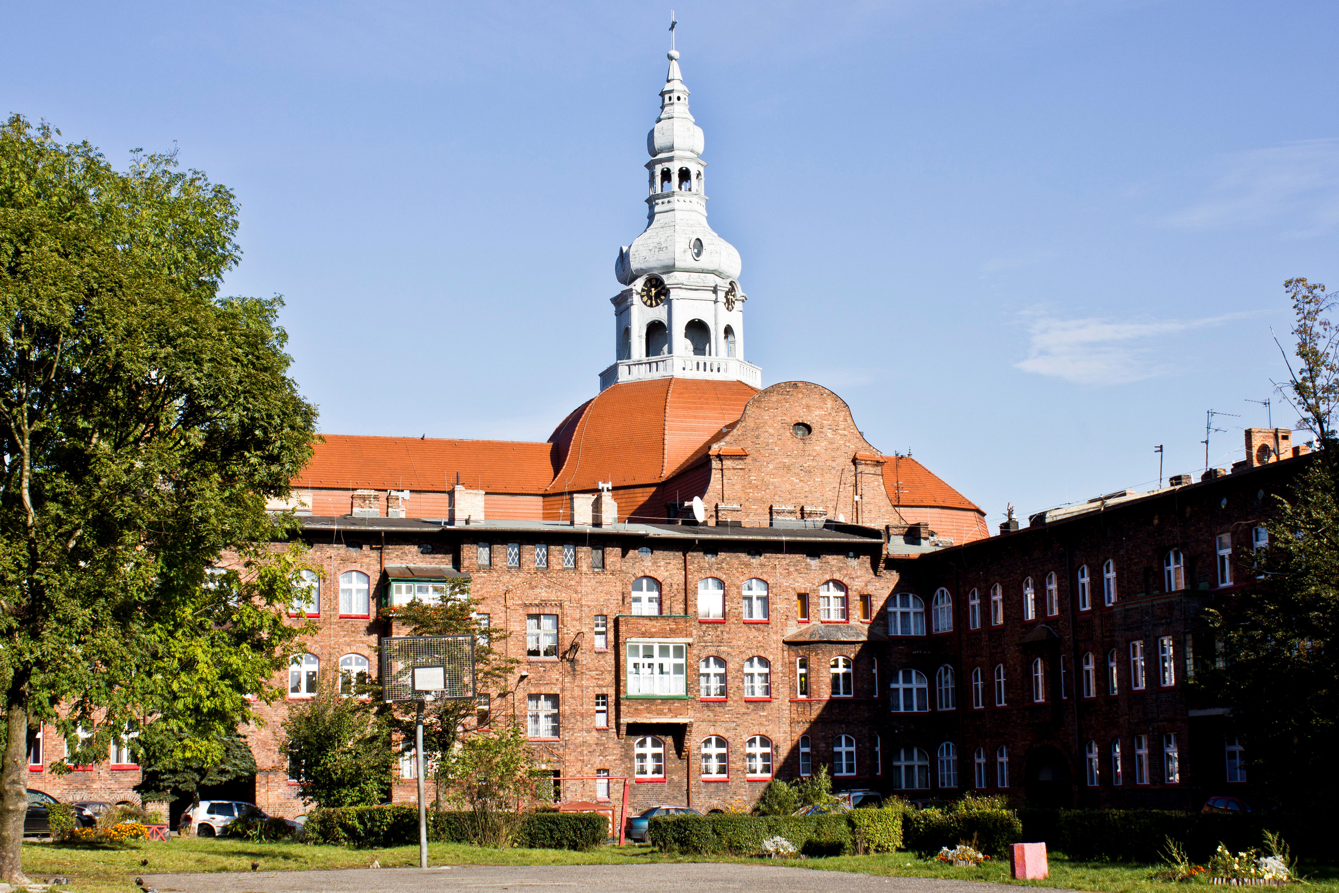 Katowice, układ urbanistyczno-przestrzenny osiedla robotniczego Nikiszowiec, 1908-1918